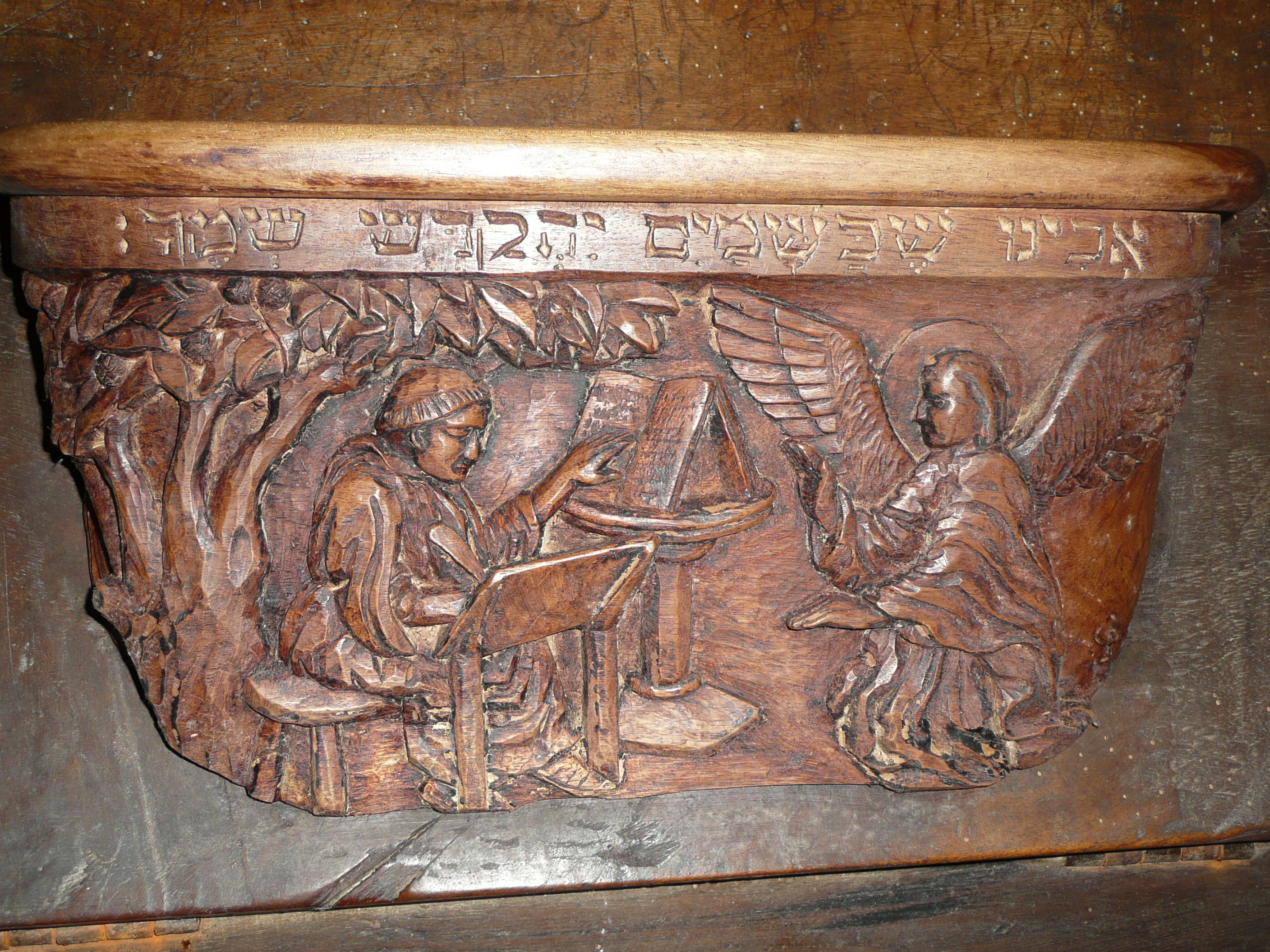 Miséricorde figurant dans les stalles de l'église de Saint-Pons-de-Thomières (34) et faisant apparaitre une inscription en hébreu. Un moine inspiré par un ange traduit un texte biblique de l'hébreu en latin. On trouve l'inscription en hébreu: "אבינו שבשמים יהקדיש שמך" (Avinu shebashamáim iheakdísh shimjá), c'est-à-dire, "Notre Père qui (es) aux cieux, ton Nom soit sanctifié".